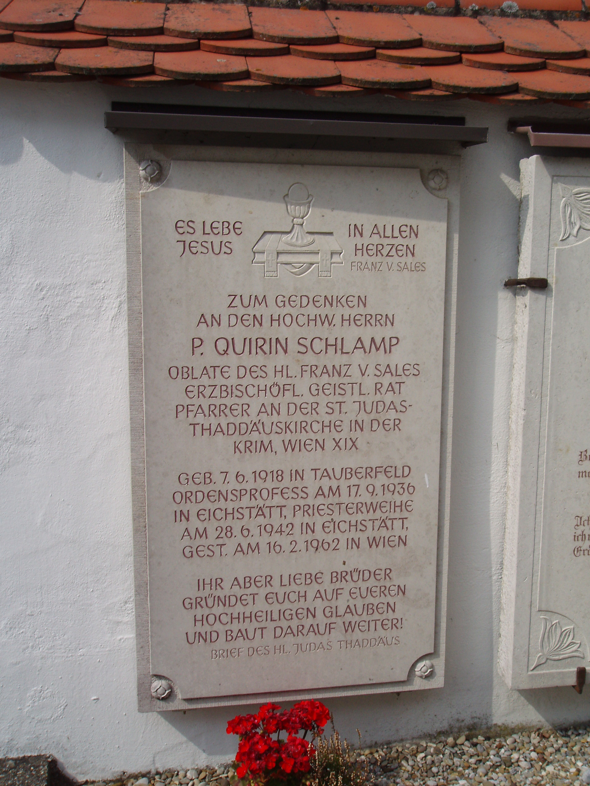 Gedenktafel_Pater_Quirin_Schlamp_in_Tauberfeld_im_Landkreis_Eichstätt